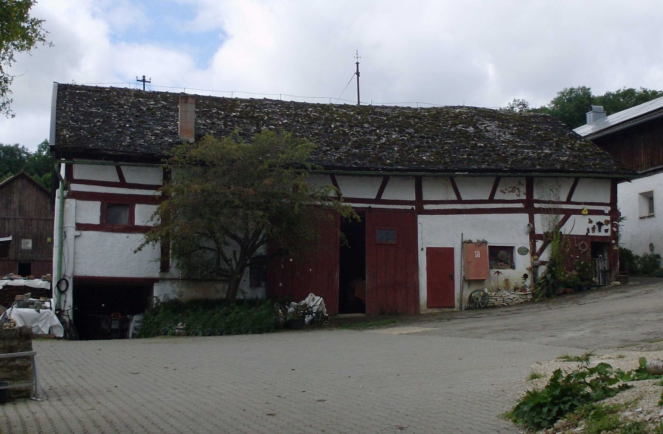 Hürth, Ortsteil von Treuchtlingen im mittelfränkischen Landkreis Weißenburg-Gunzenhausen, Stadel in Jura-Bauweise